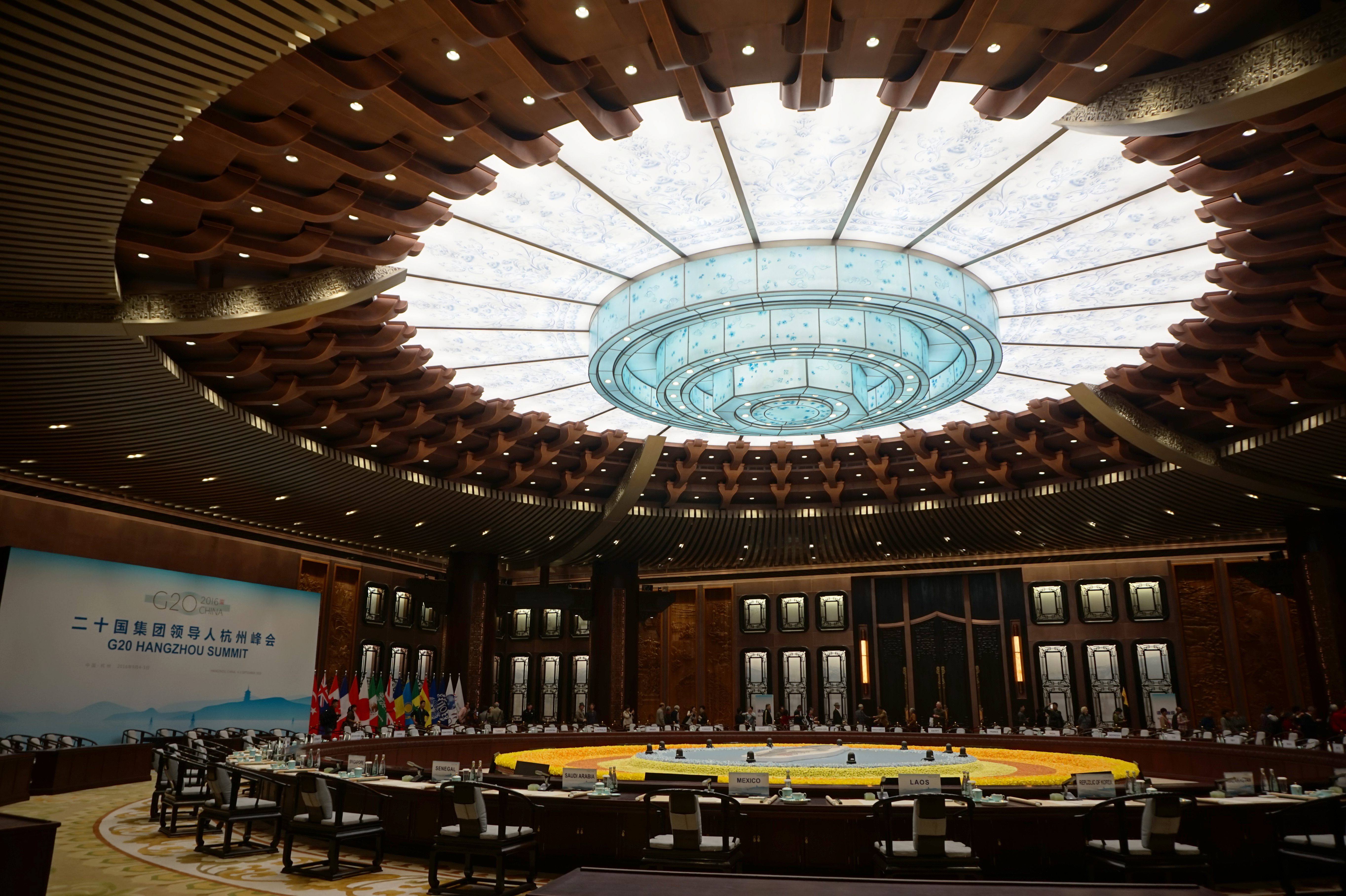 杭州国际博览中心会议厅。